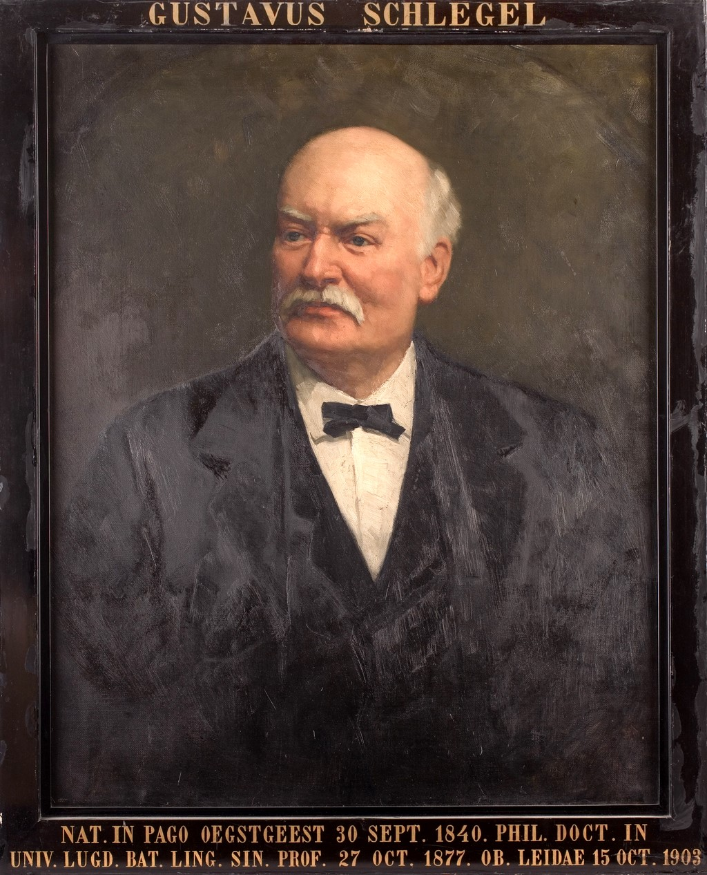 Leids hooglerarenportret van Gustaaf Schlegel, Bijzondere Collecties Universiteitsbibliotheek Leiden. Icones Leidenses 286